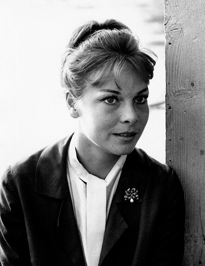 Gabriella Pallotta, Rome